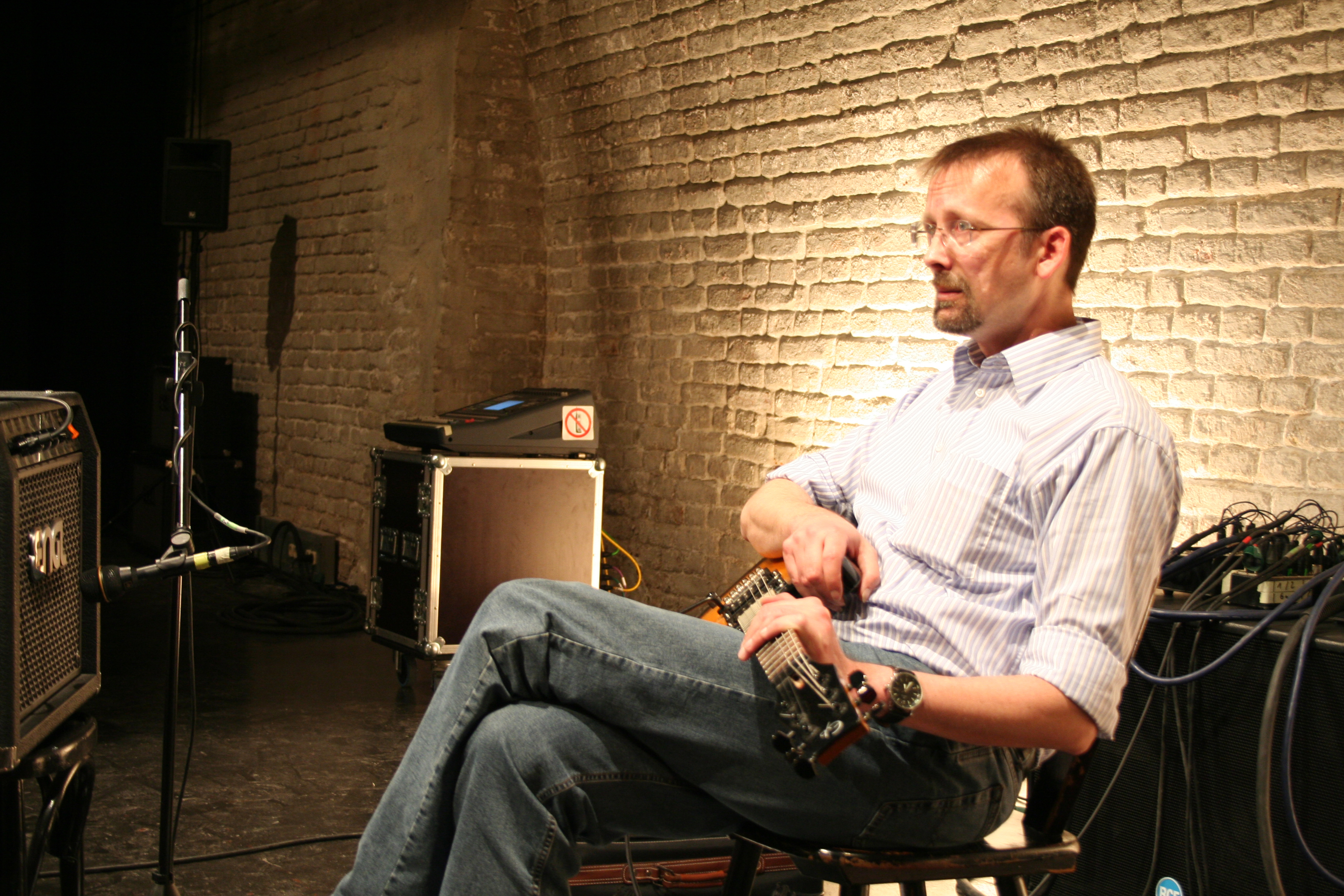 Harald Lillmeyer bei einer Probe in der Münchner T-U-B-E (Tube)